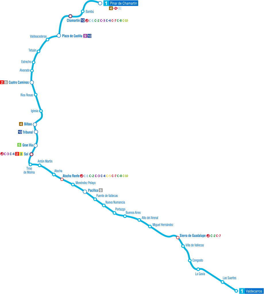 Recorrido de la línea 1 del Metro de Madrid